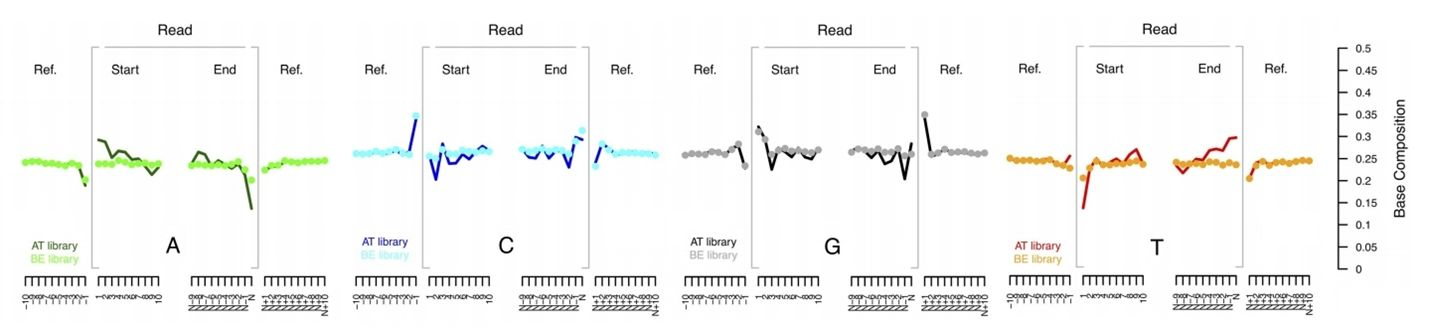 Sekų tendencingumo vizualizacijos – santykiniai bazių sudėties grafikai.